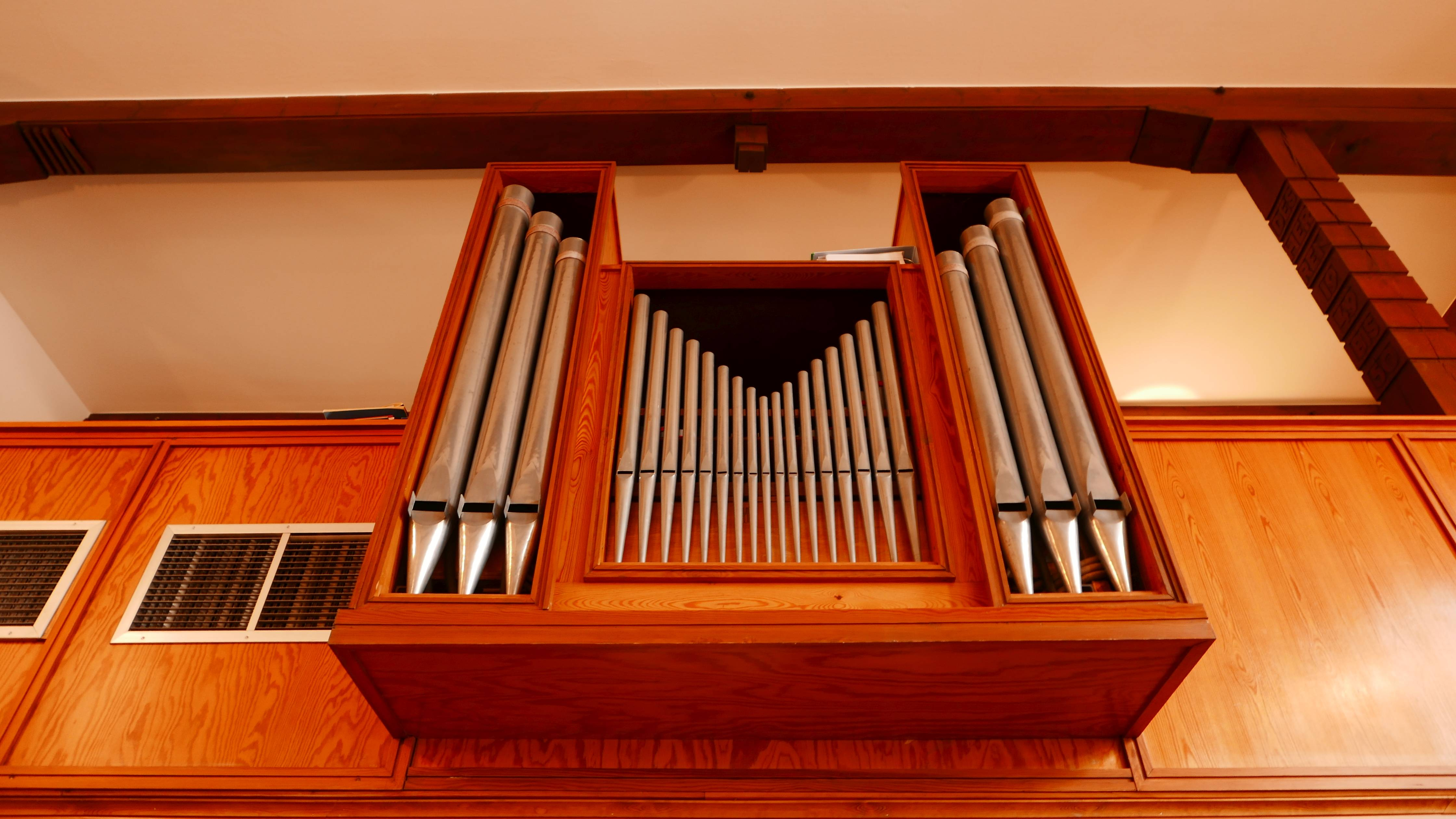 Zionskirche in Allendorf/Lumda, Landkreis Gießen, Hessen, Deutschland